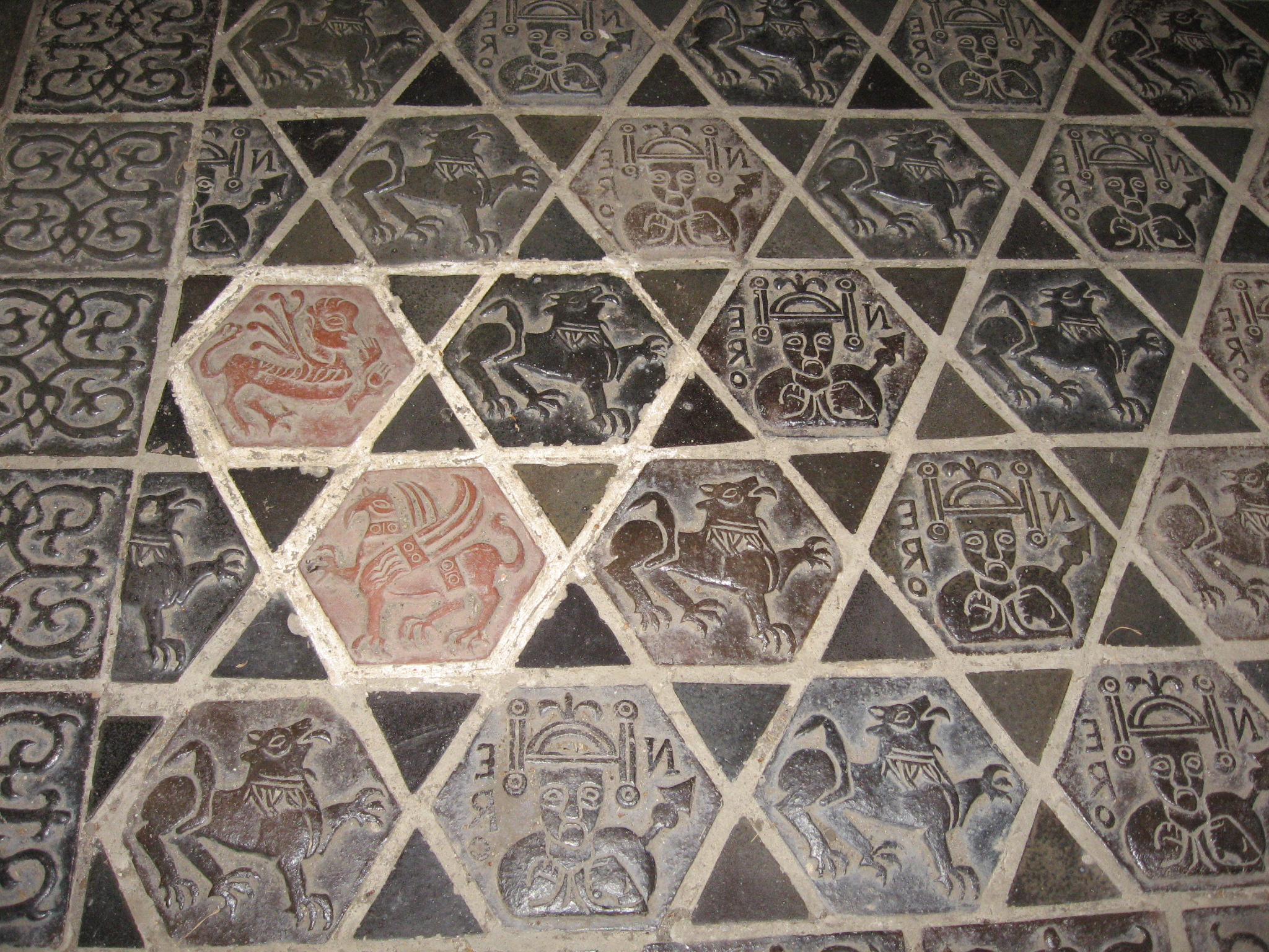 Dlažba v rotundě sv. Petra (replika z původních vzorů), Starý Plzenec, okr. Plzeň-město